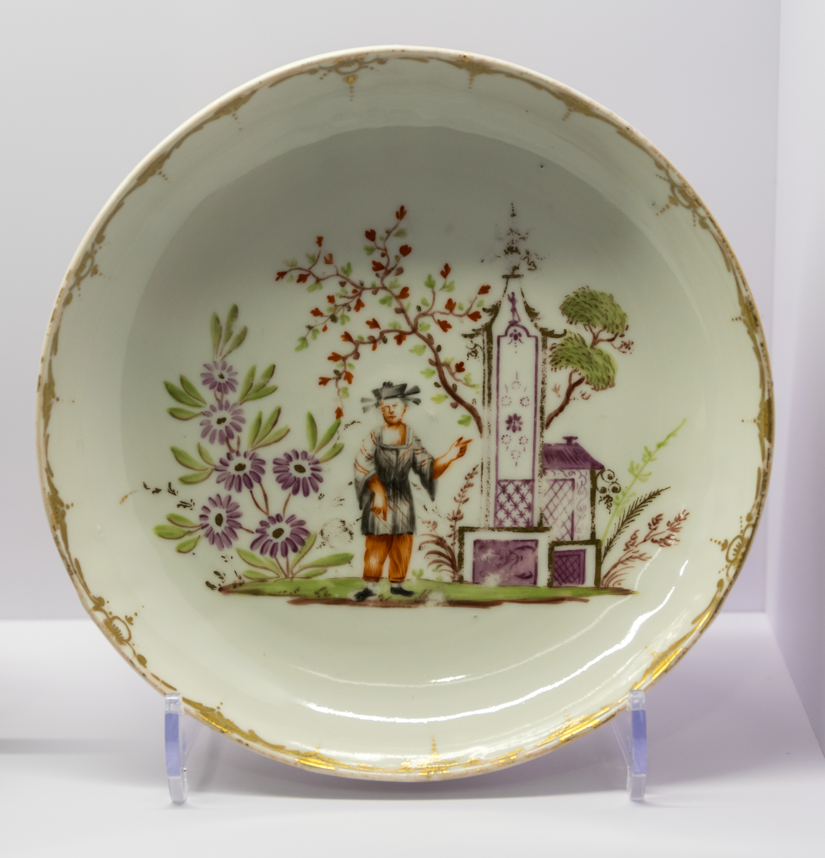 Museum Schloss Fürstenberg; Unterschale mit Chinoiseriedekor, um 1753, Dekor: Johann Christof Glaser